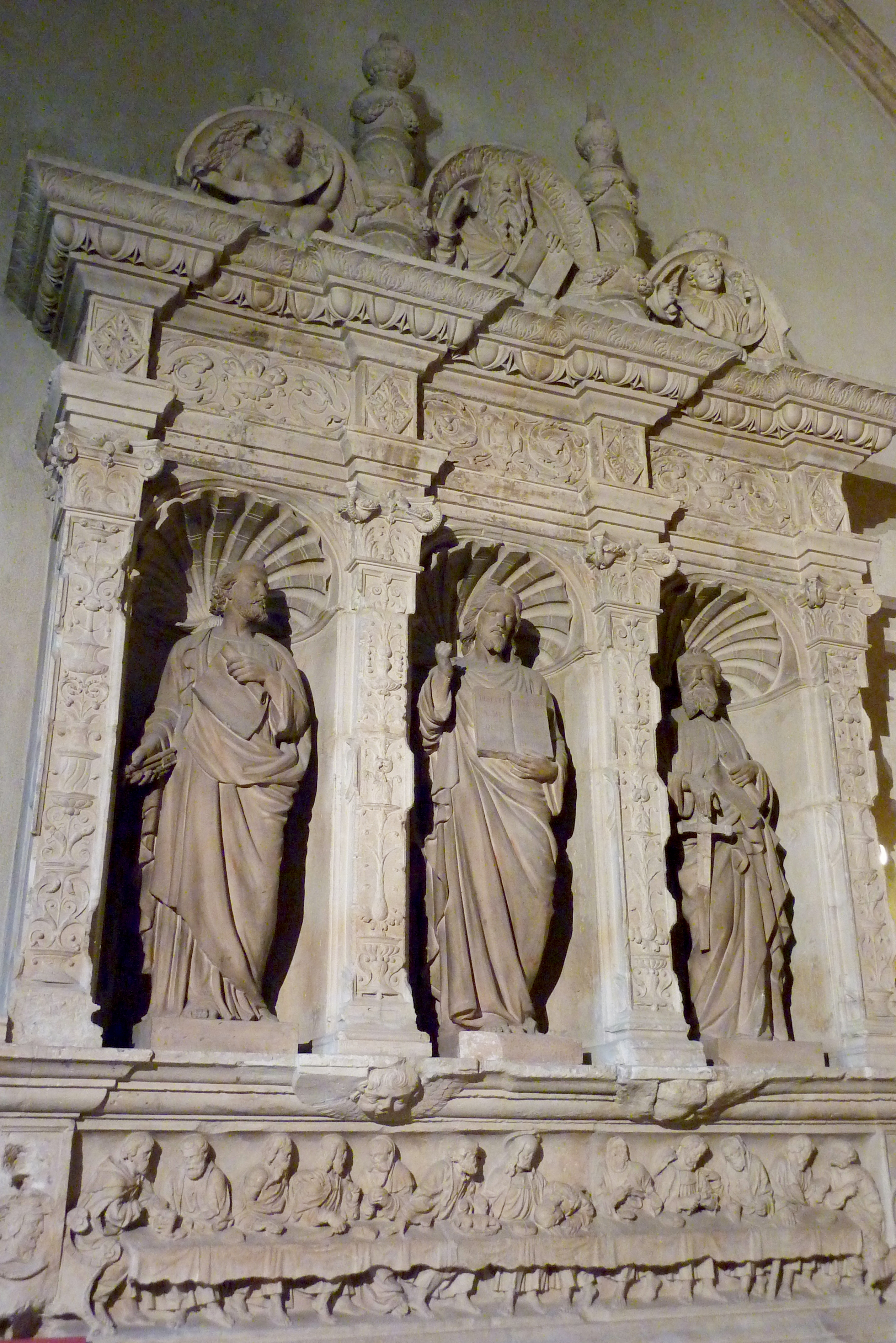 Katholische Kirche Saint-Pierre in Avignon, Renaissance-Altar der Arme-Seelen-Kapelle